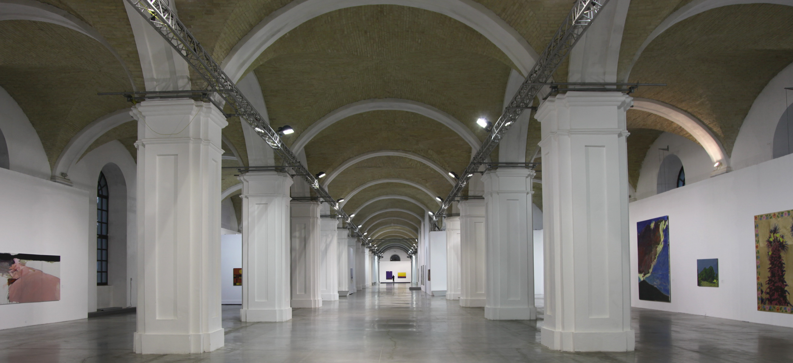 Проект галереї "Український пейзаж" в Мистецькому Арсеналі, 2014